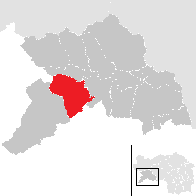 Lage von Sankt Georgen am Kreischberg im Bezirk Murau